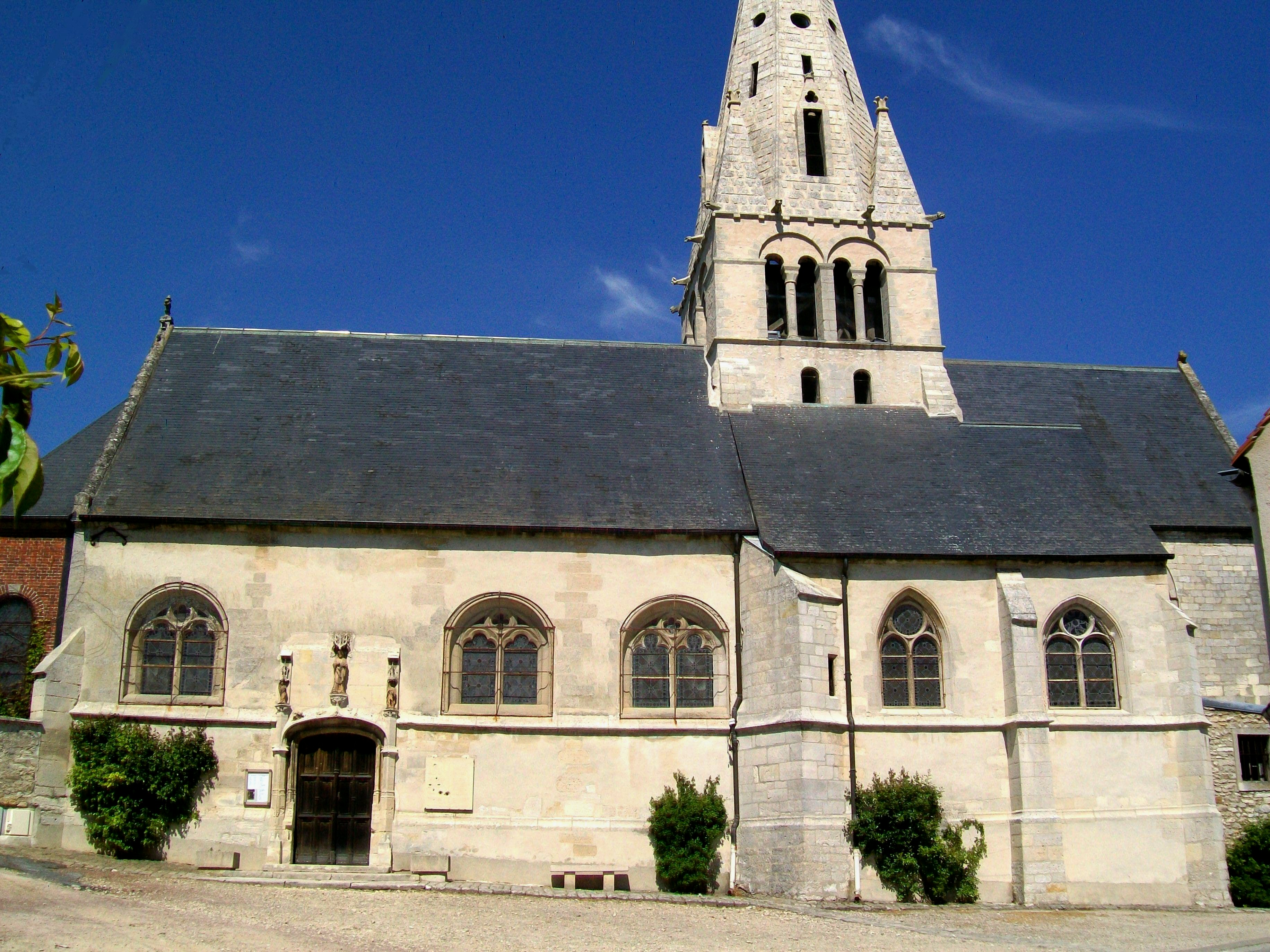 L'église Notre-Dame de Chamant est enclavée entre de différentes propriétés et ne dispose que d'une petite place devant la façade sud.